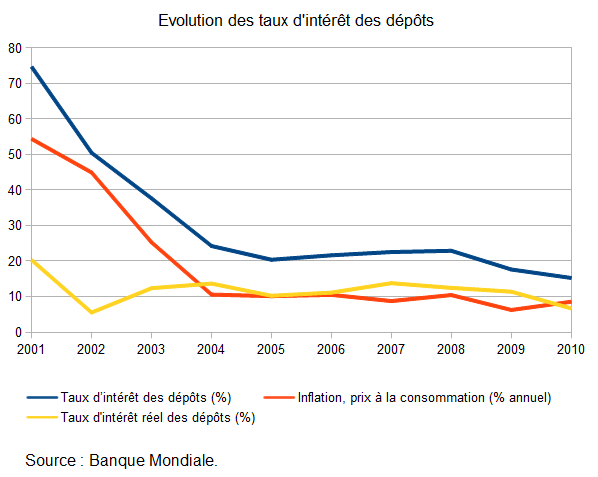 Évolution des taux d'intérêt des dépôts en Turquie - Source: Banque Mondiale